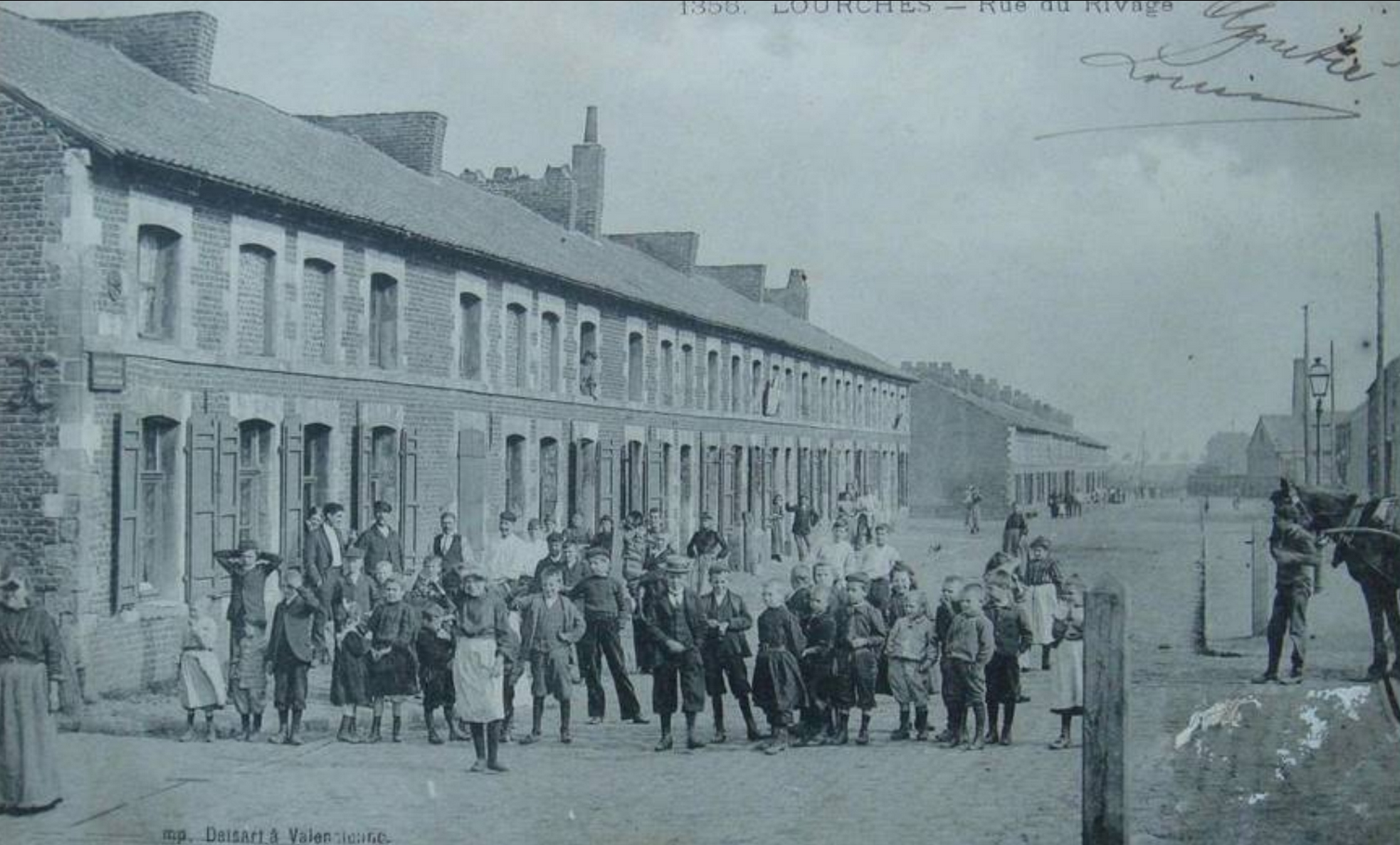 Cités de la fosse Saint-Mathieu de la Compagnie des mines de Douchy, Lourches, Nord, Nord-Pas-de-Calais, France.